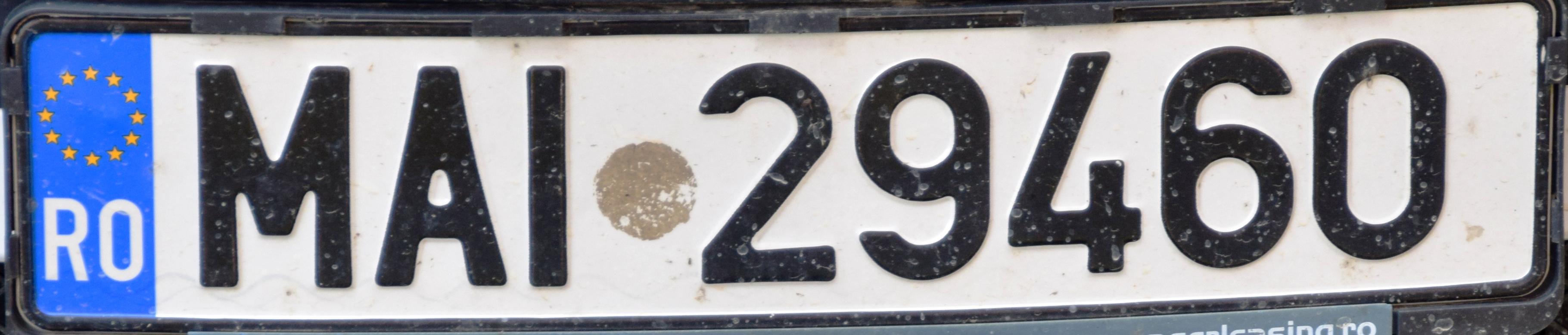 politie kentekenplaat Roemenië